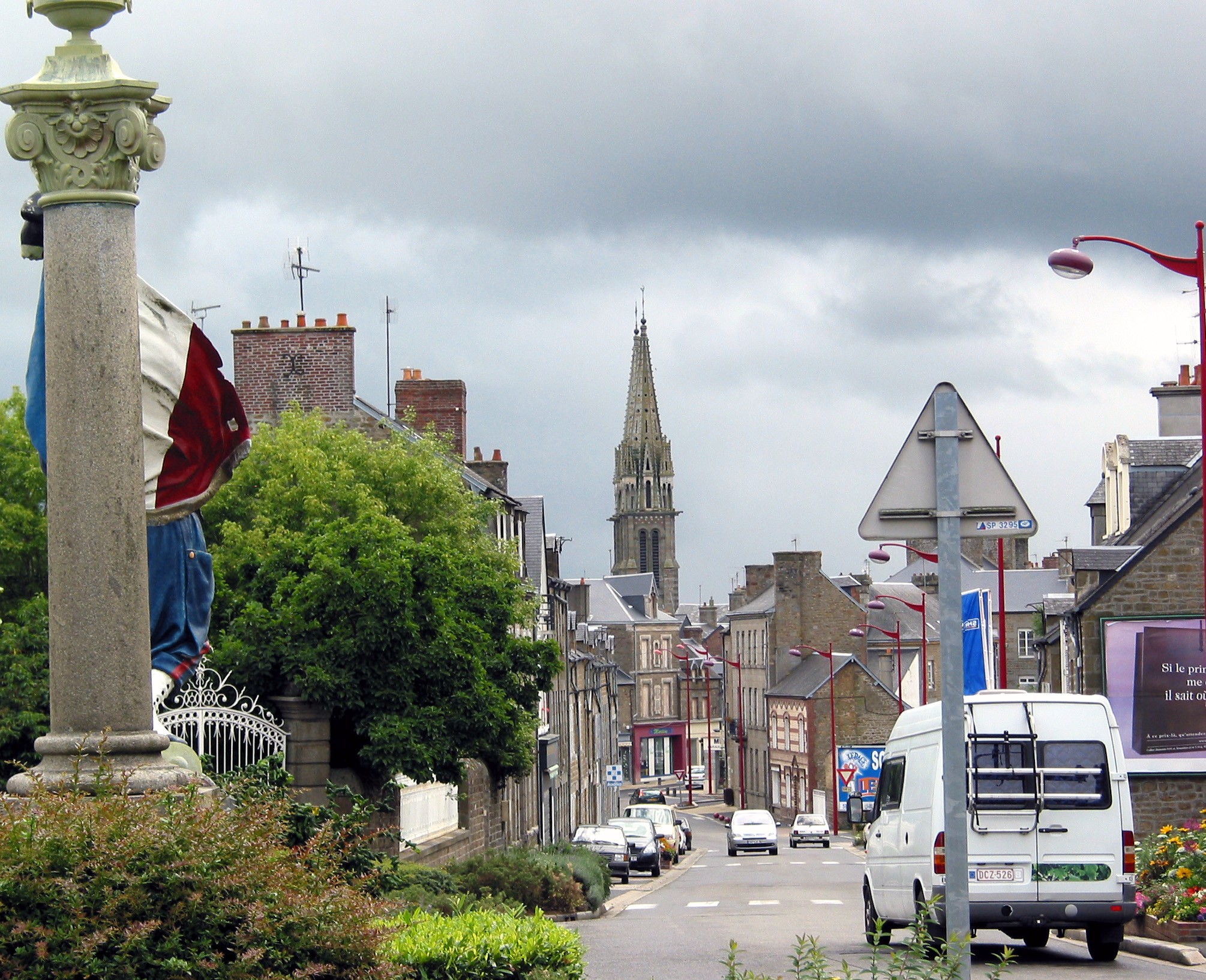 L'avenue Thiers permet de rejoindre la rue d'Hautvie, rue la plus commerçante de la ville, ainsi que le faubourg d'Argentan, ancienne route de Rânes. On aperçoit à l'arrière plan le clocher de l'église.